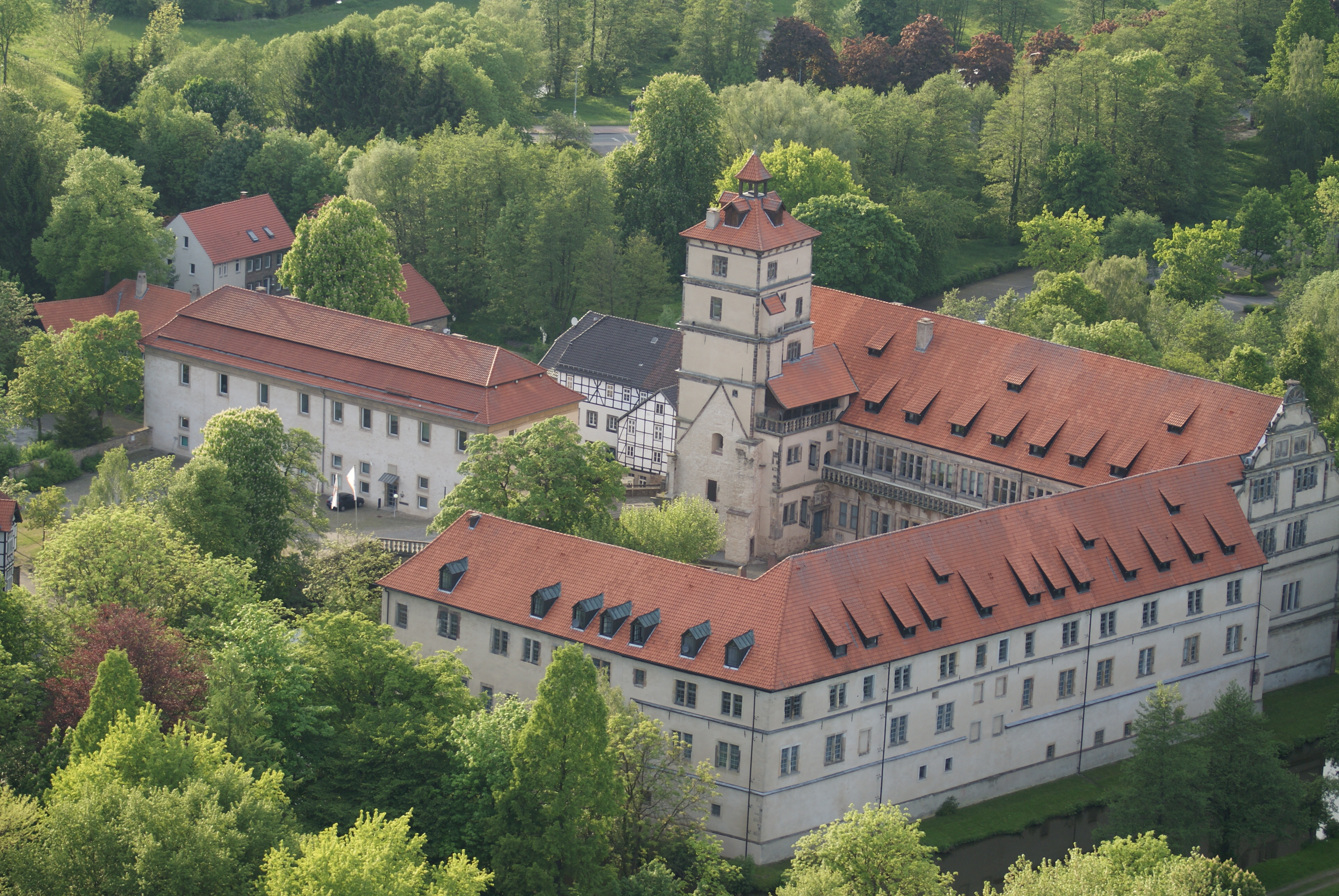 Luftaufnahme Schloss Brake, Stadt Lemgo, Nordrhein-Westfalen This is a photograph of an architectural monument.It is on the list of cultural monuments of Lemgo